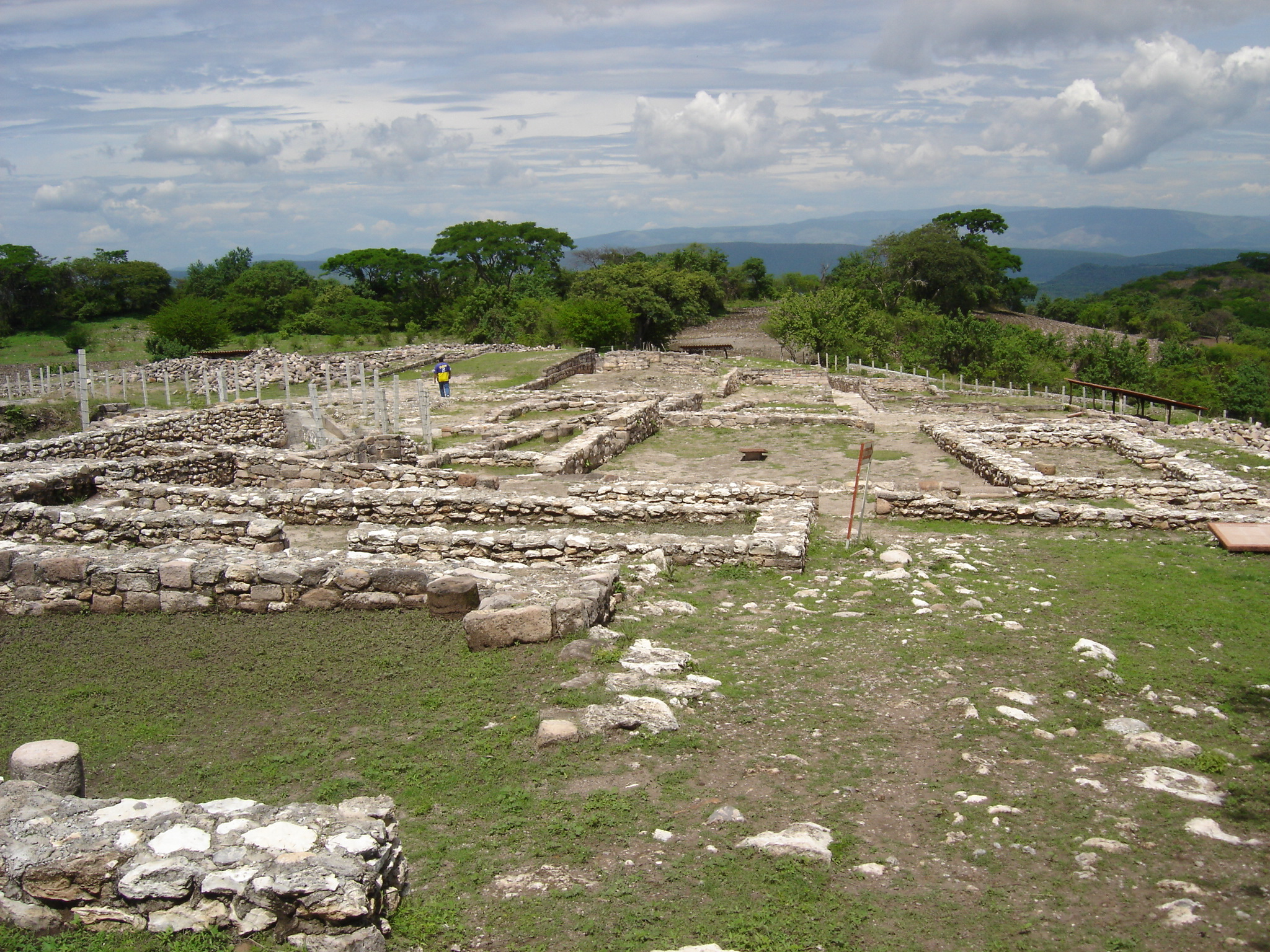 Zona Arqueológica de Xochipala, Eduardo Neri, Guerrero/ Xochipala Arqueologic Zone, Guerrero